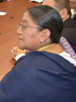 En su comparecencia amte la Comisión de Relaciones Internacionales y Seguridad Pública, la ex canciller Nina Pacari Vega Conejo